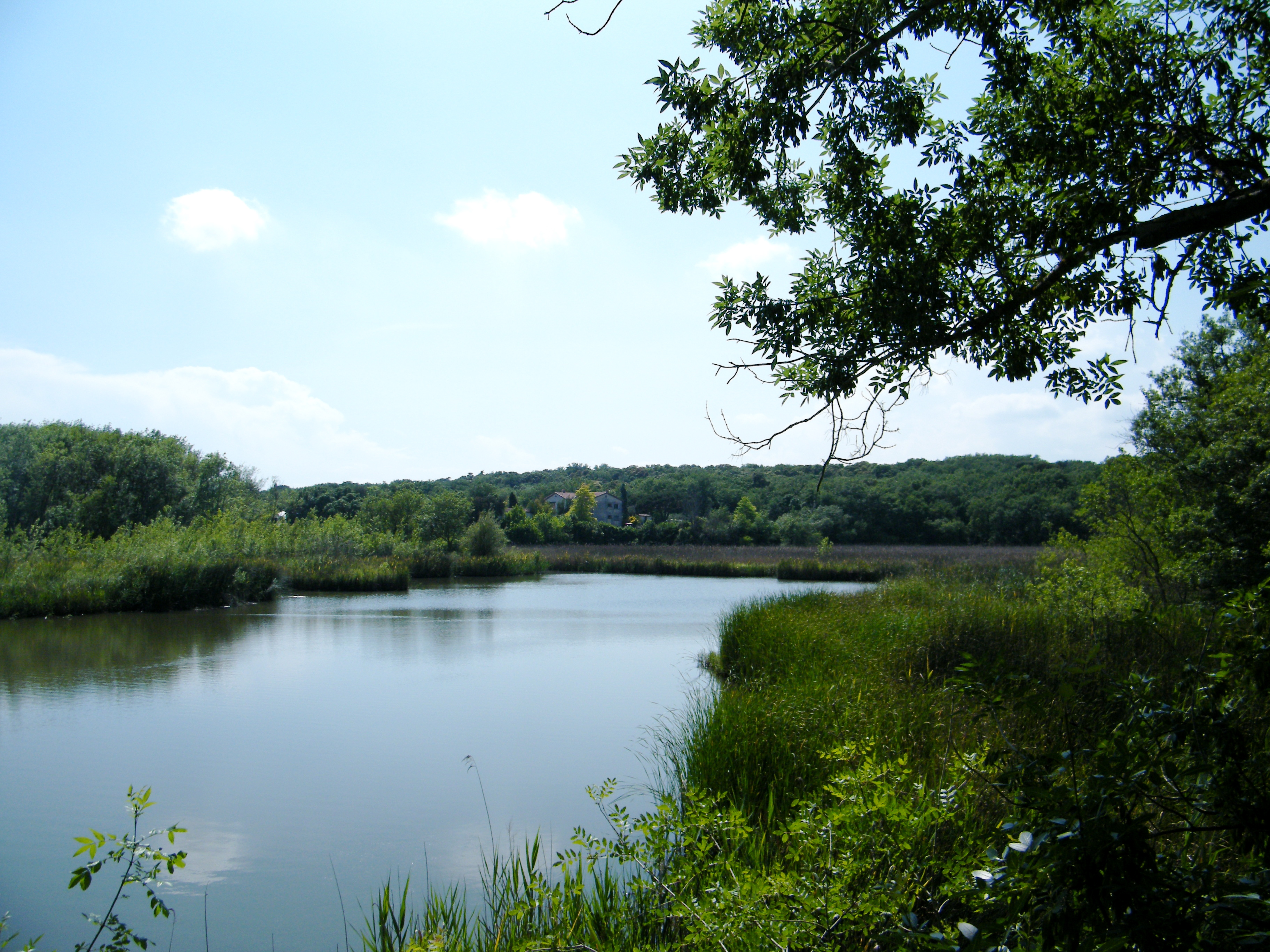 Photo de l'étang du Parc departemental de Vaugrenier, France